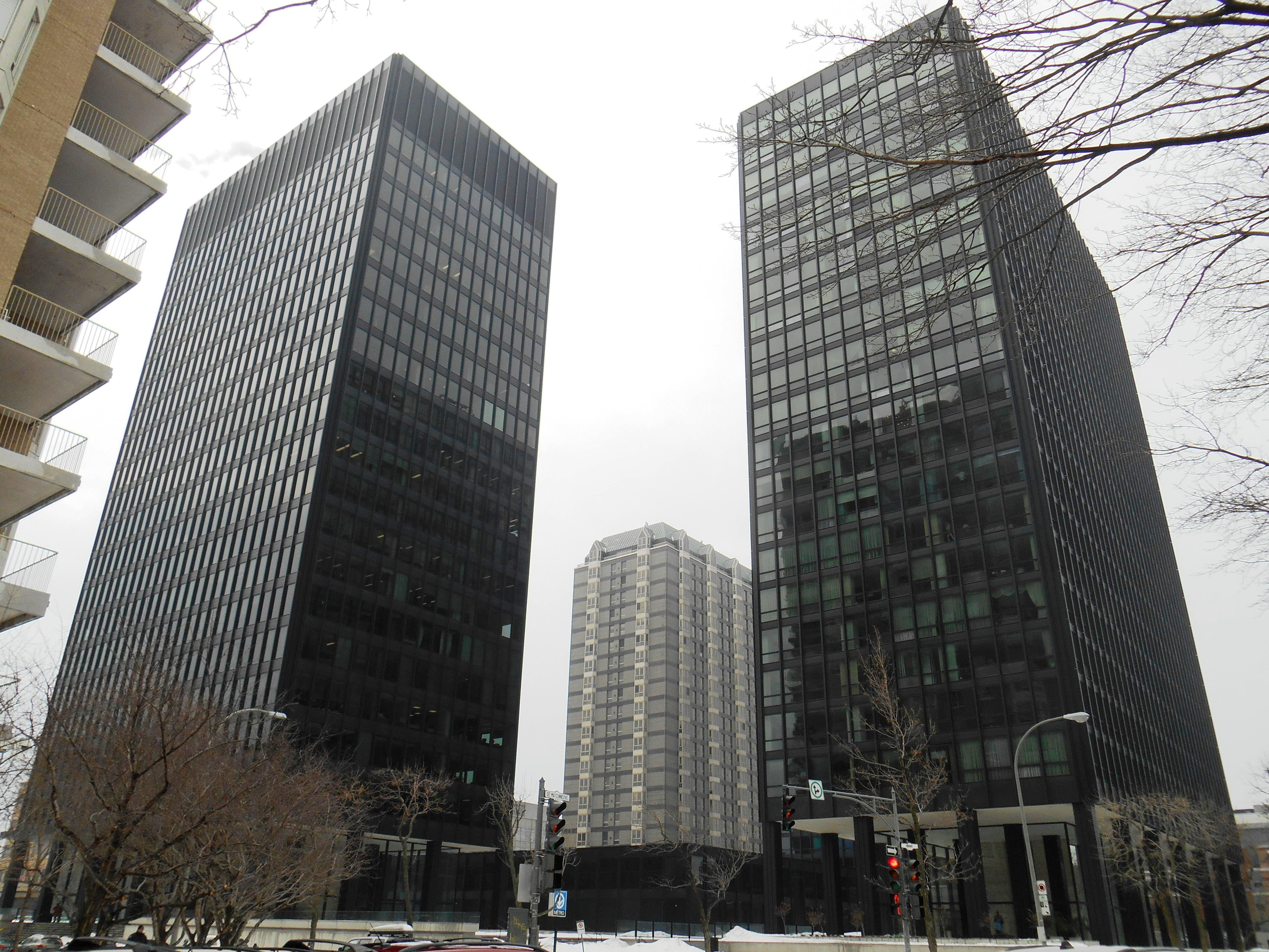 Westmount Square est un complexe de 4 édifices conçu par l'architecte Ludwig Mies van der Rohe